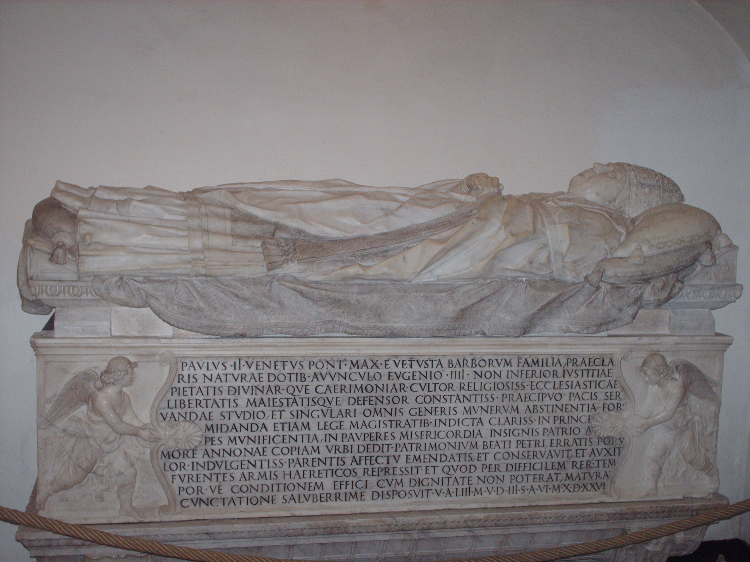 Tomb of pope Paulus II, "grotte vaticane", Basilica di San Pietro